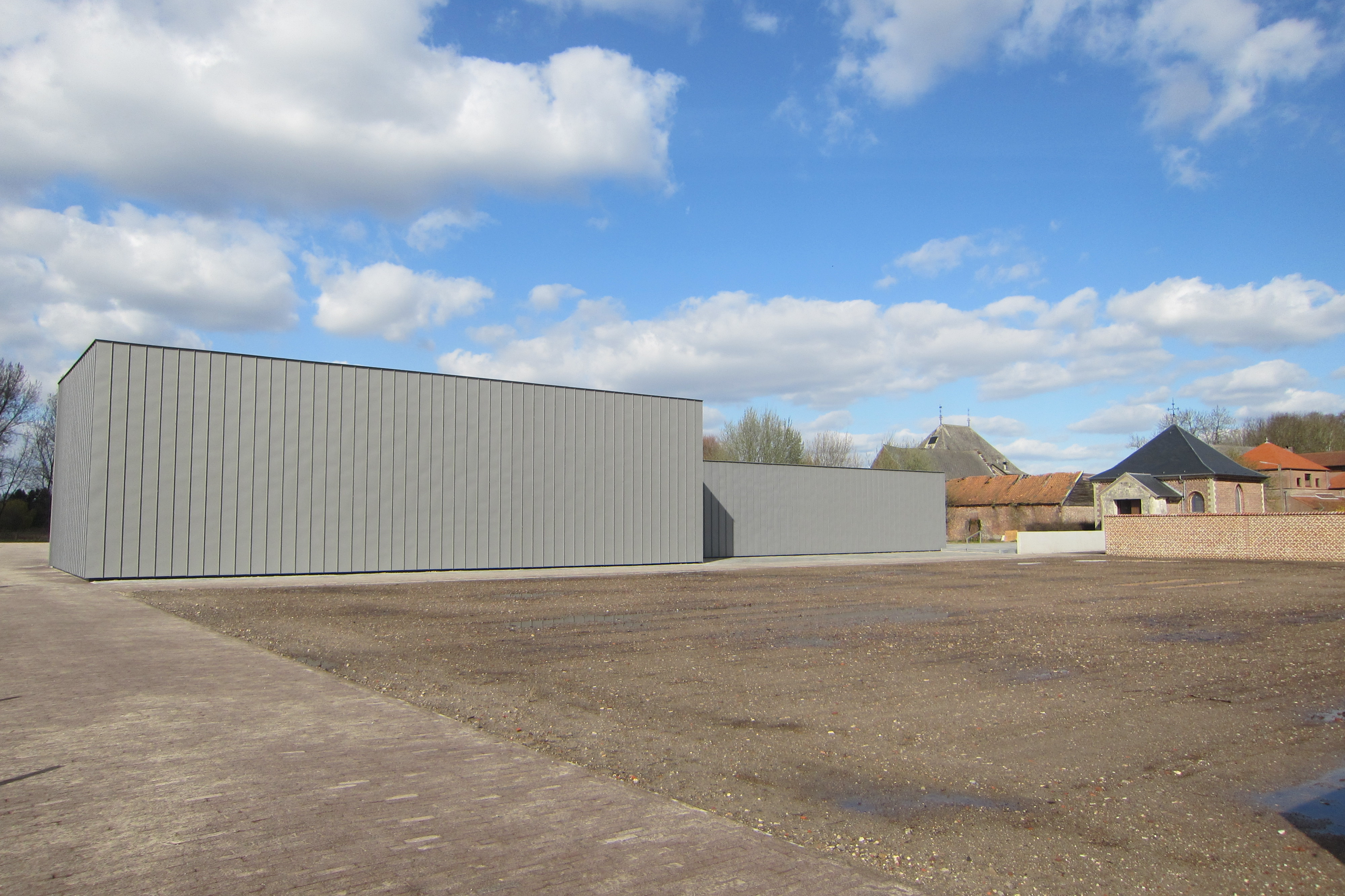 Hans Op de Beeck, exterieur installatie The Quiet View, 2015, site Herkenrode, Hasselt